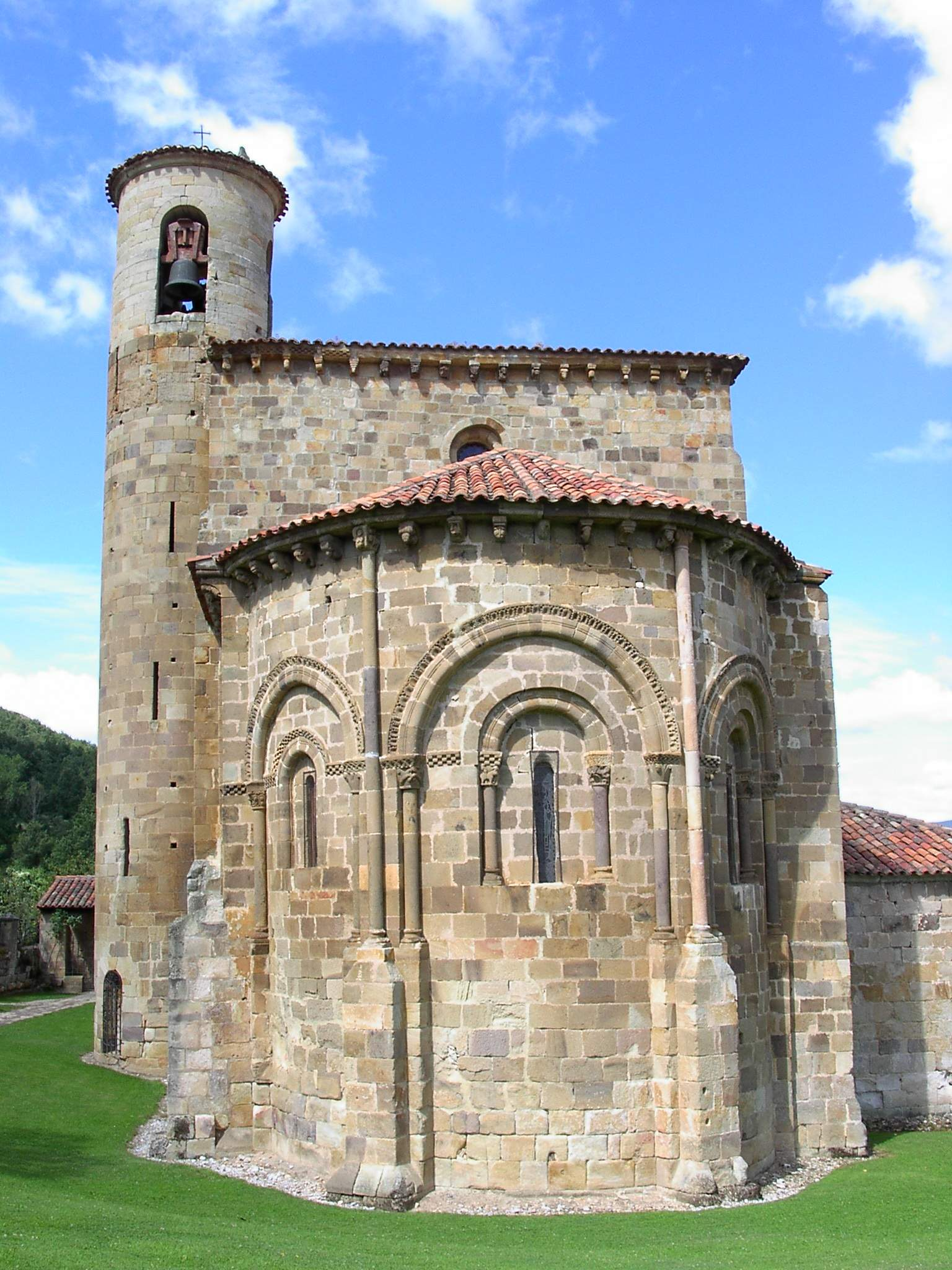 Colegiata de San Martín de Elines (Cantabria).